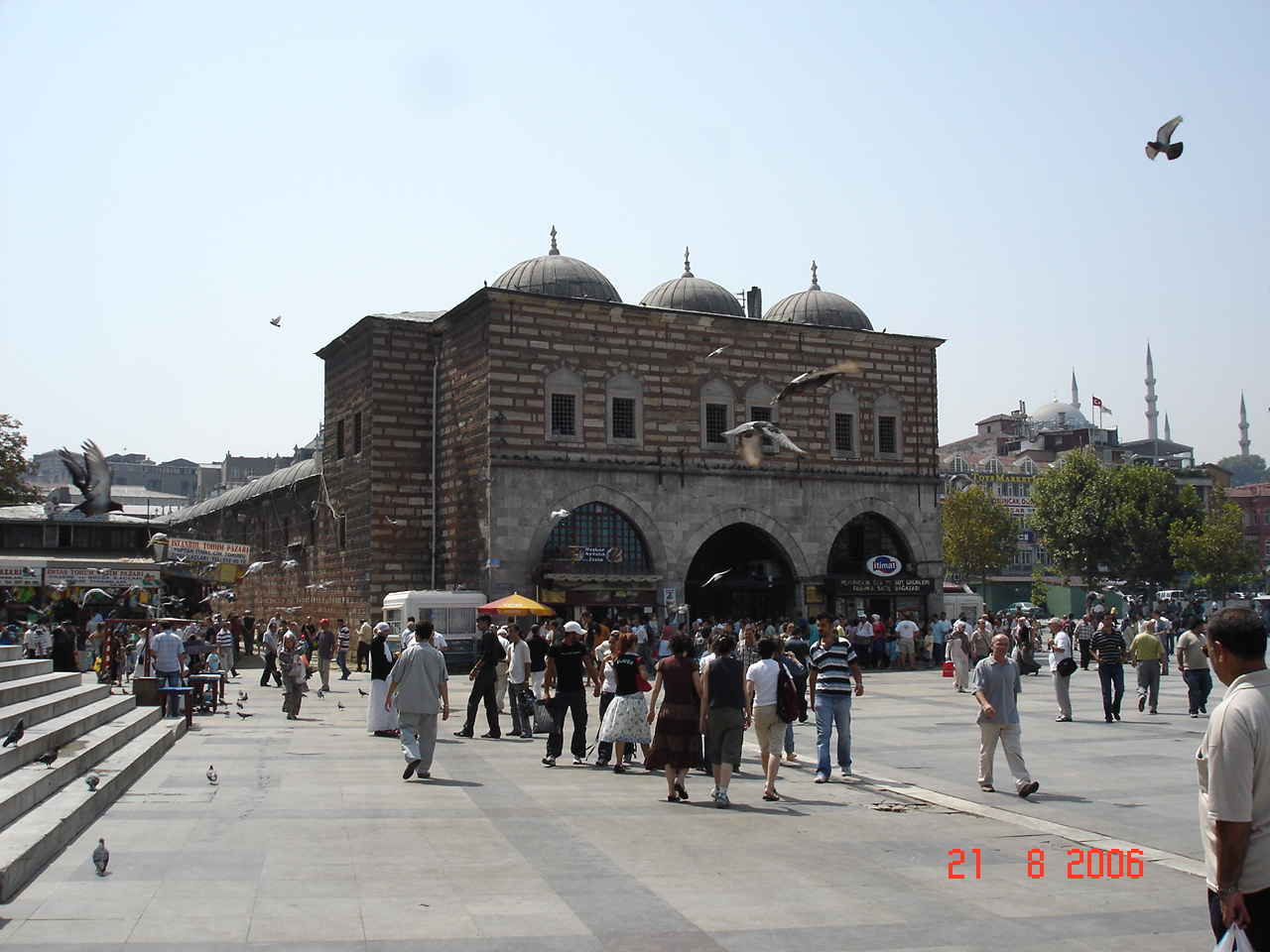 Spice Bazaar, Istanbul